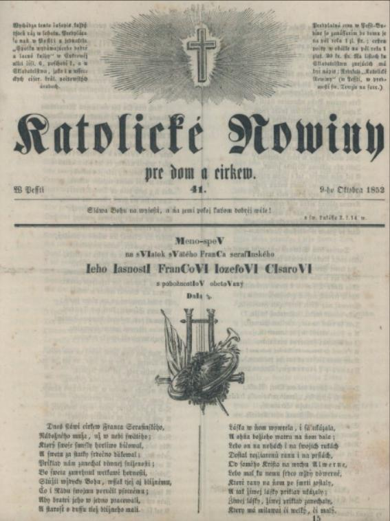 Titulný list periodika Katolické nowiny